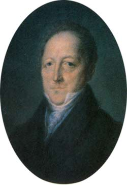 Сергей Львович Пушкин (1770-1848), отец поэта А.С. Пушкина. Неизв. художник. 1810-е гг.